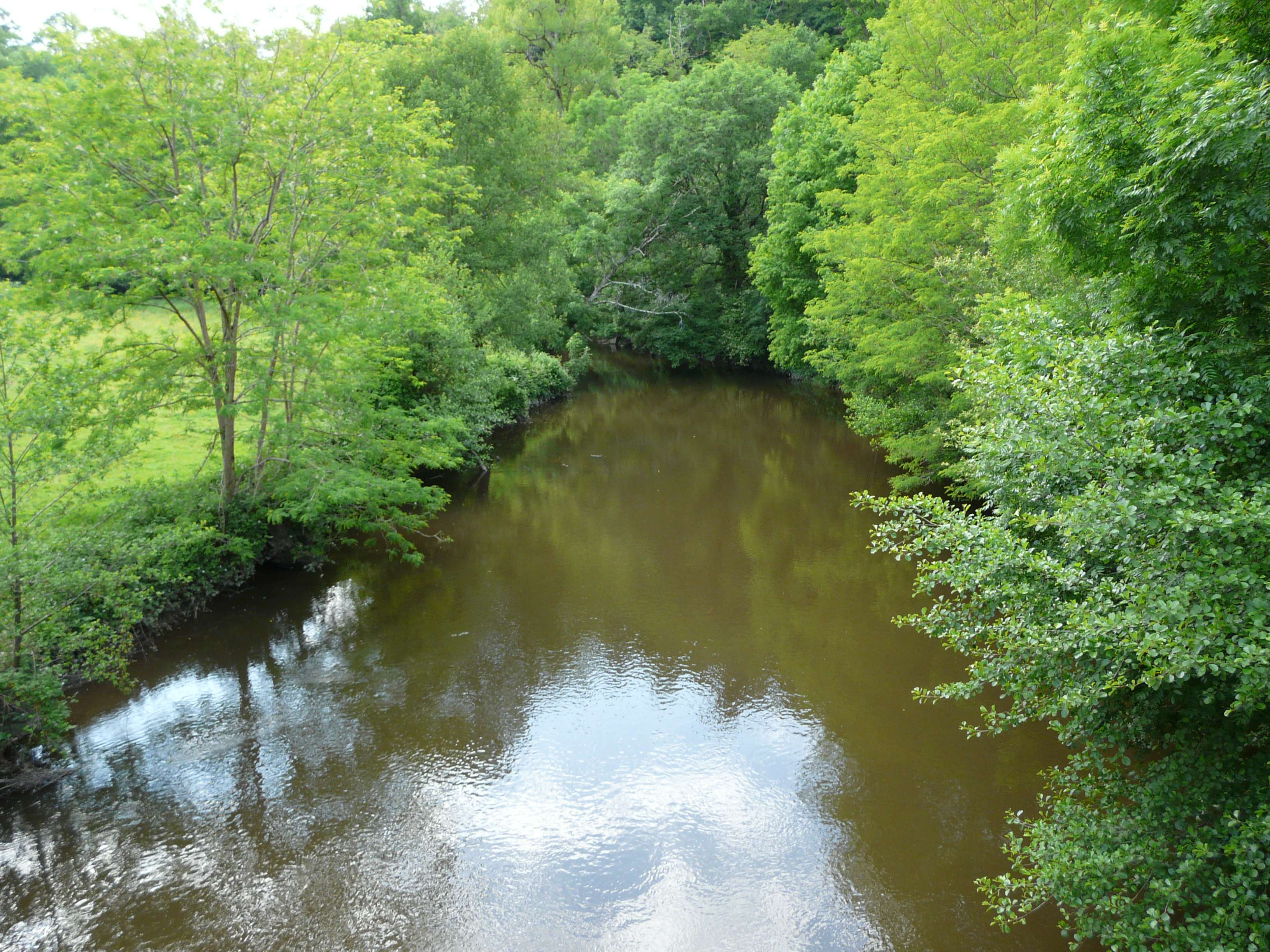 La Tardoire en aval du pont qui relie la route départementale (RD) 3 (commune de Bussière-Badil, en Dordogne à gauche) et la RD 112 (commune d'Écuras, en Charente à droite).